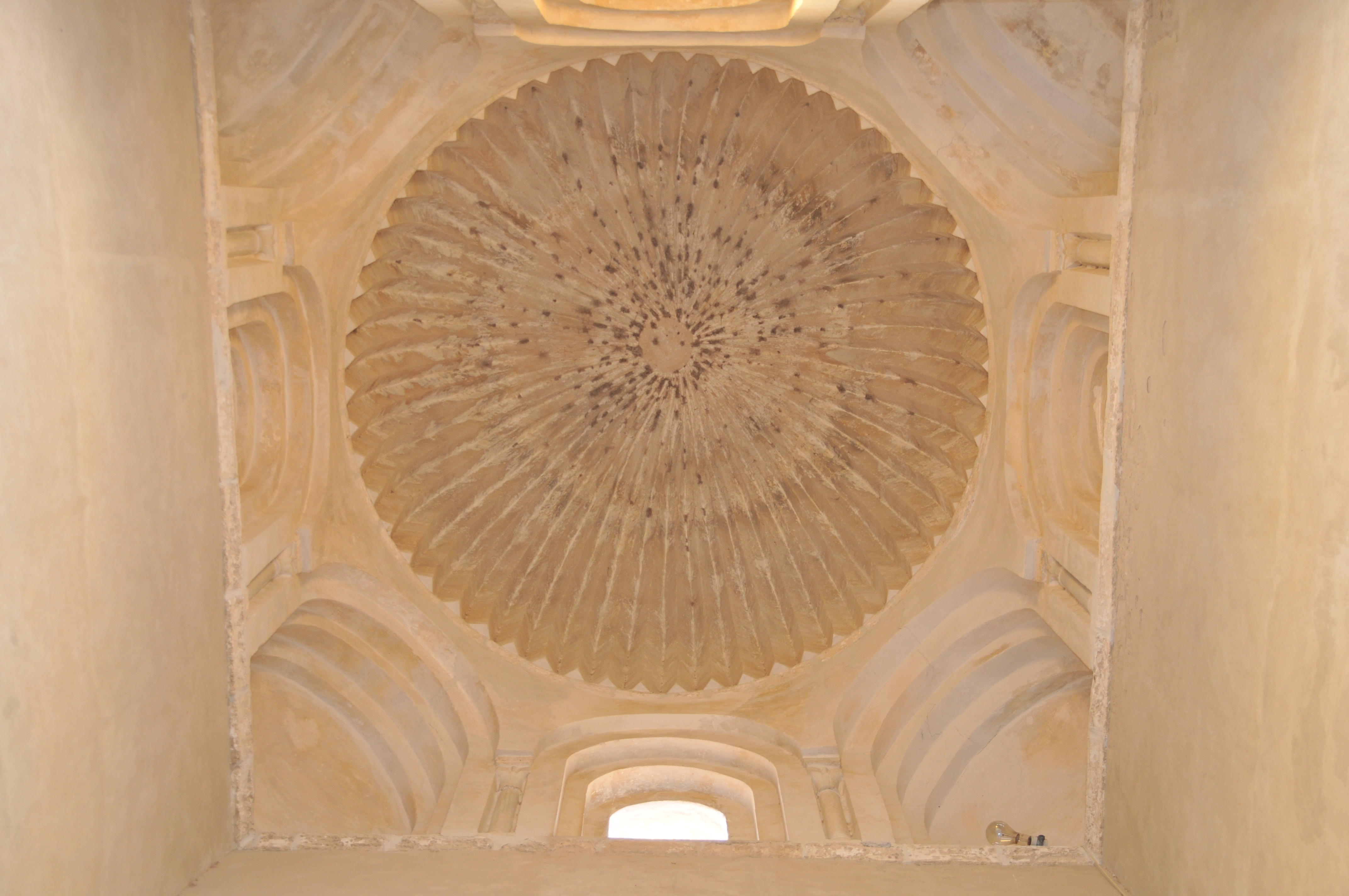 Vue intérieure de la coupole coiffant Bab Lalla Rihana, l'un des porches de la Grande Mosquée de Kairouan, en Tunisie.